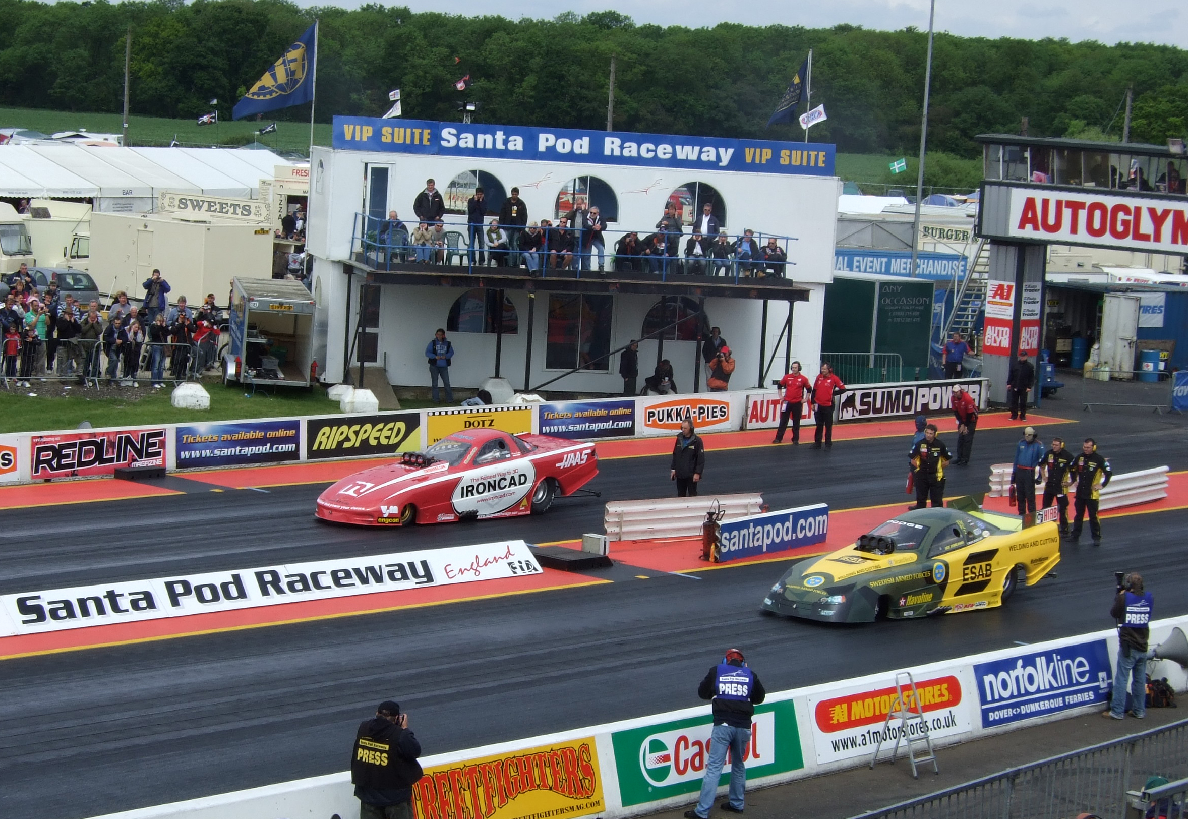 dragracing at Santa Pod